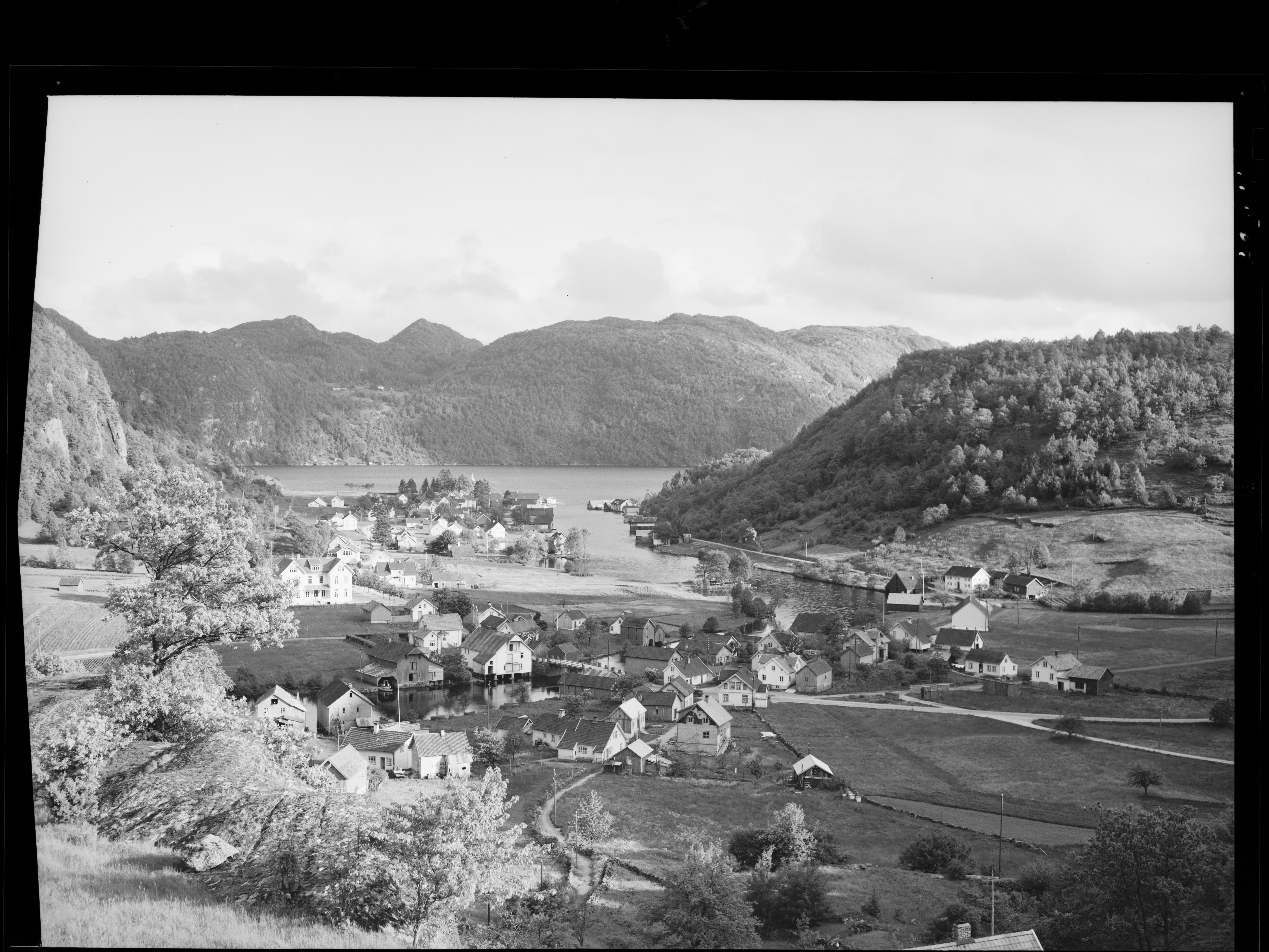 Bildet er hentet fra Nasjonalbibliotekets bildesamling. Anmerkninger til bildet var: Fotograf ukjent Feda, Kvinesdal, Vest Agder